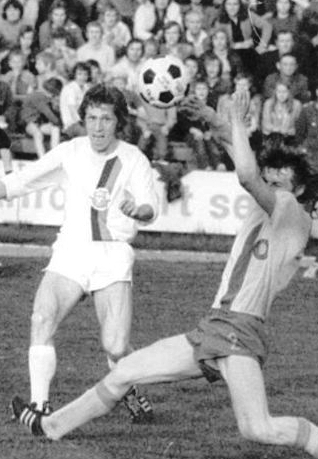 Title: FC Hansa Rostock - 1. FC Lok Leipzig 0:0- Factual corrections and alternative descriptions are encouraged separately from the original description. Additionally errors can be reported at this page to inform the Bundesarchiv. Original historic description: ADN-ZB-Sindermann- -14.5.1975-str-Rostock: Fußball-Oberliga FC Hansa Rostock - 1. FC Lok Leipzig 0:0- Im Kampf gegen den drohenden Abstieg konnte die Rostocker Mannschaft am 14.5. vor heimischer Kulisse nicht überzeugen und muß weiterhin um den Klassenerhalt bangen. Gröbner (Lok-r.) stoppt einen von Kehl (Mitte) vorgetragenen Rostocker Angriff. Torwart Friese hat keine Mühe.